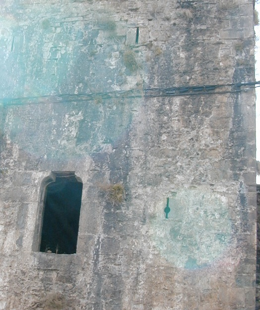 Detalles defensivos en fachada de torre